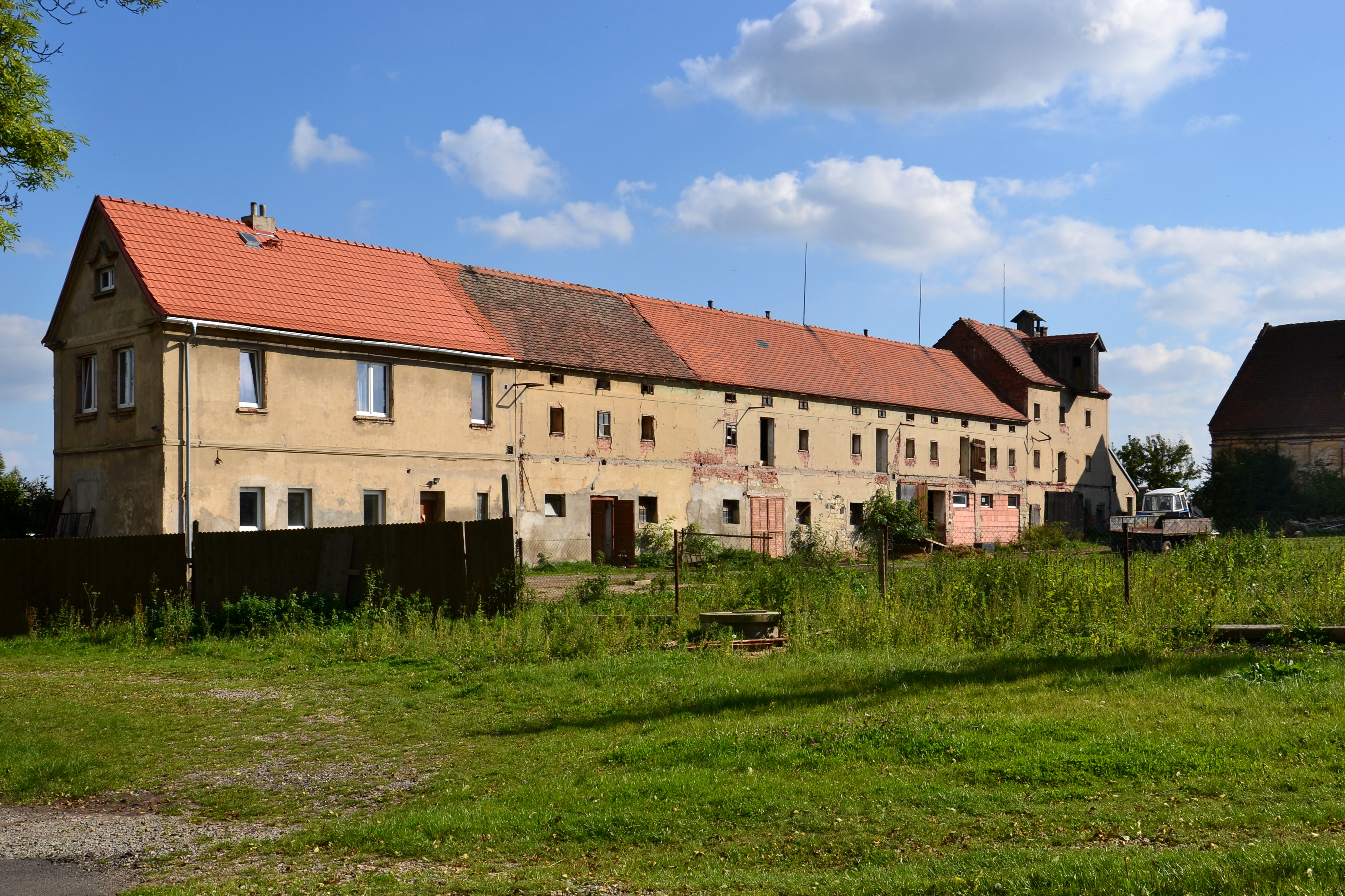 Přeskaky - zemědělský dvůr